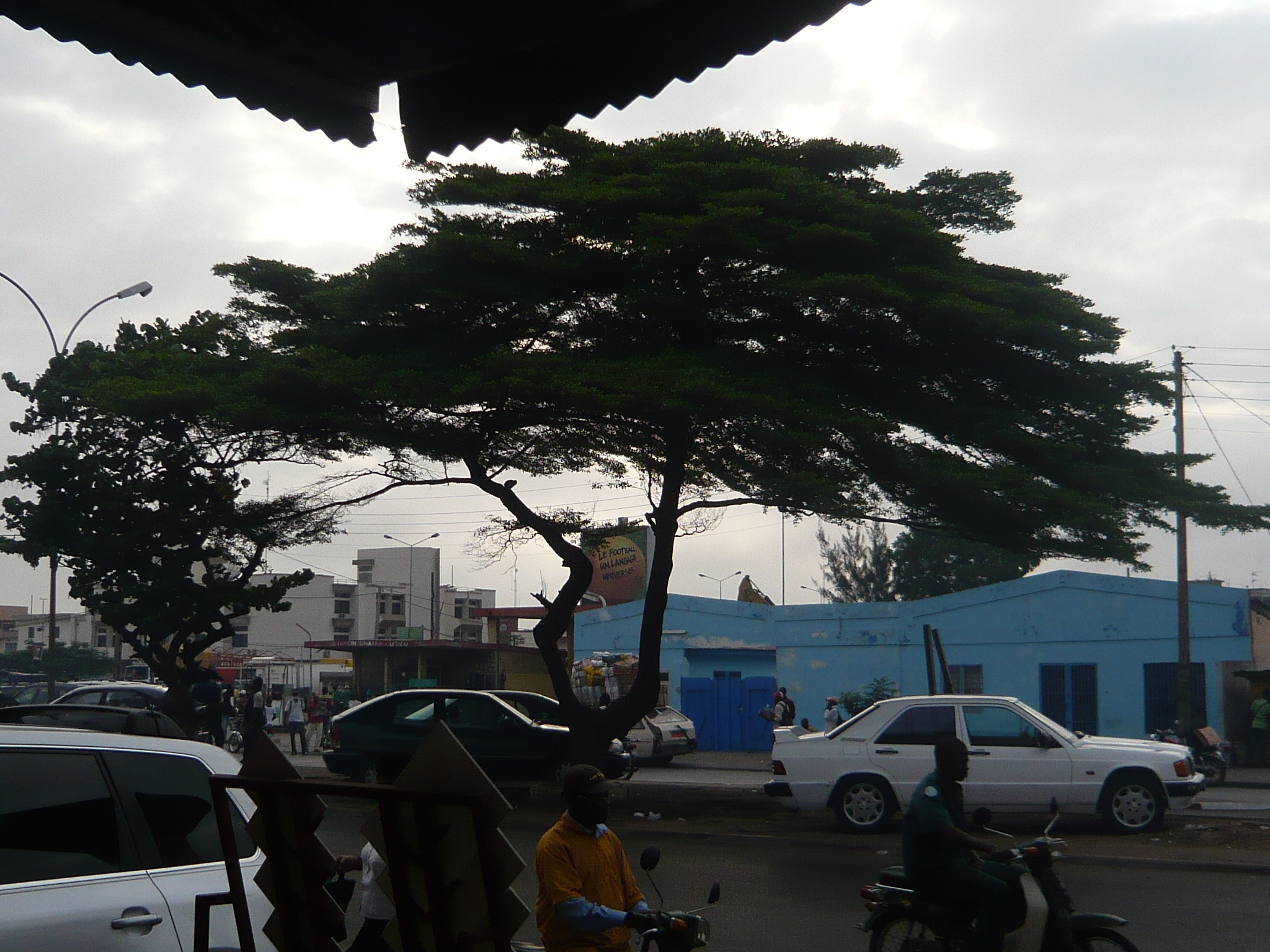 surstrate en Kotonuo, Benino